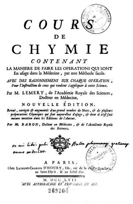 Couverture du "Cours de chymie" de Lémery (mort en 1715), édition de 1757, revue et commentée par Baron